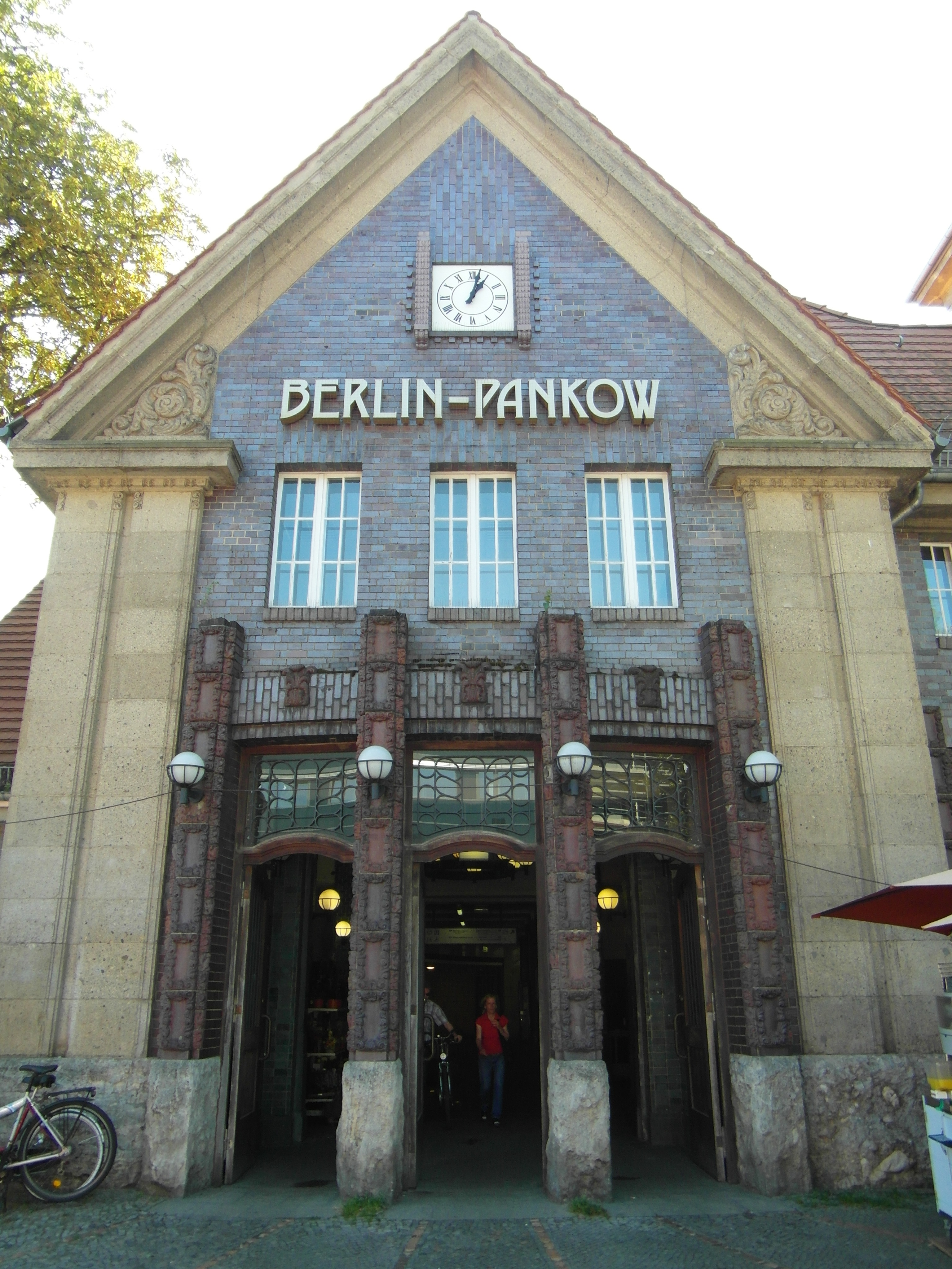 Linien S2, S8, S9 (zeitweise)